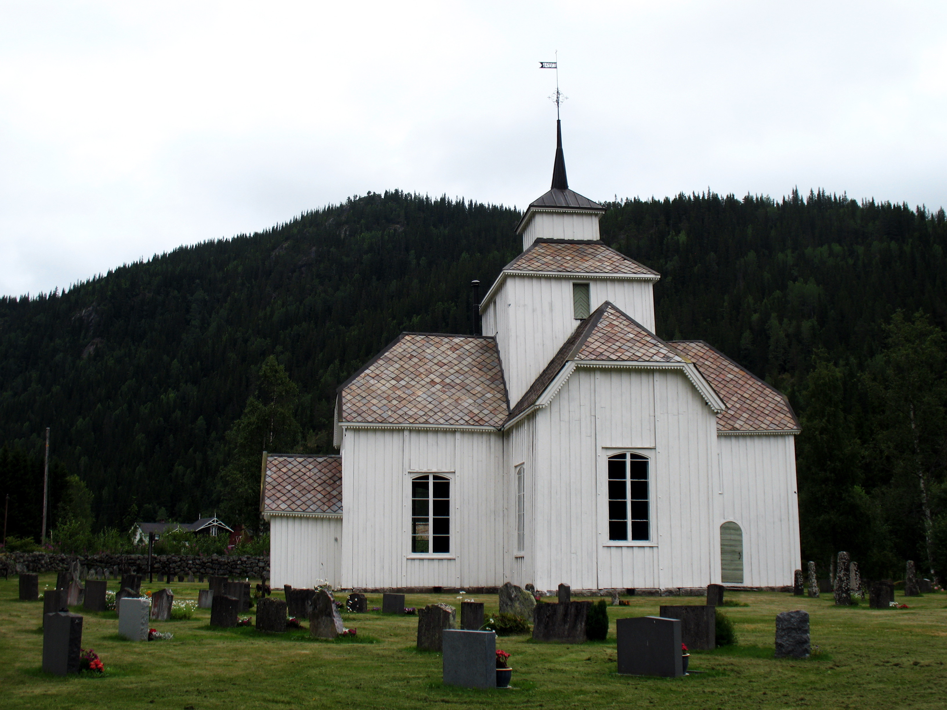 Åmotsdal kyrkje i Seljord kommune, Agder og Telemark bispedømme; Vest-Telemark prosti. Korskyrkje bygd i 1792, arkitekt Jarand Aasmundsson Rønjom. Frå sør.